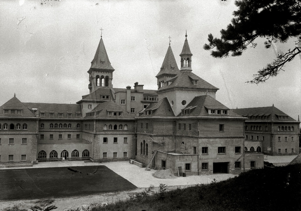 Título original: Seminario Diocesano en el paseo de Heriz (9/31) Localización: San Sebastián (Guipúzcoa)